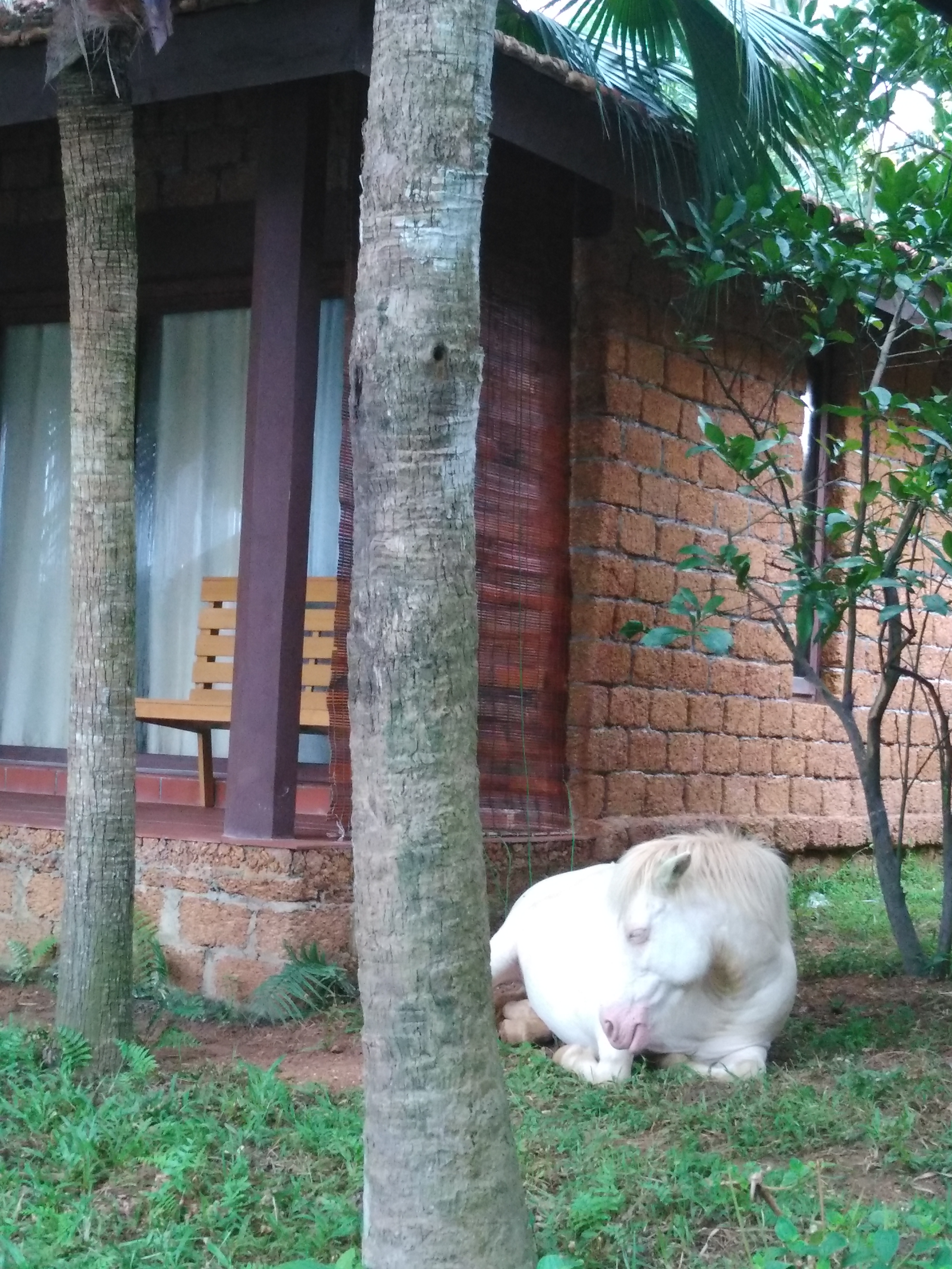 Hình chụp bằng máy ảnh cá nhân về một con ngựa bạch Việt Nam ở Trung Sơn Trầm, Sơn Tây